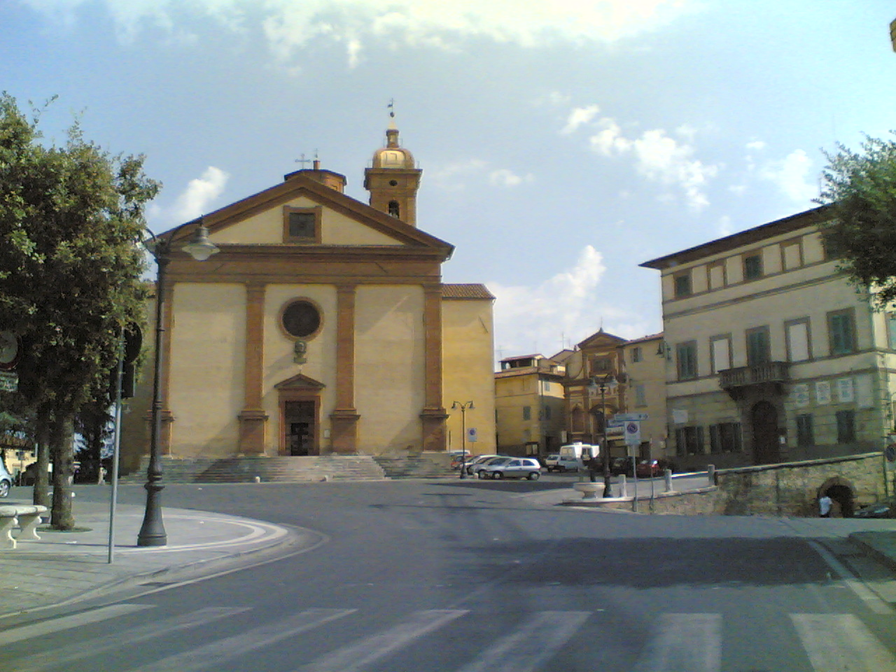 "Collegiata" church, Sinalunga (Siena, Italy)